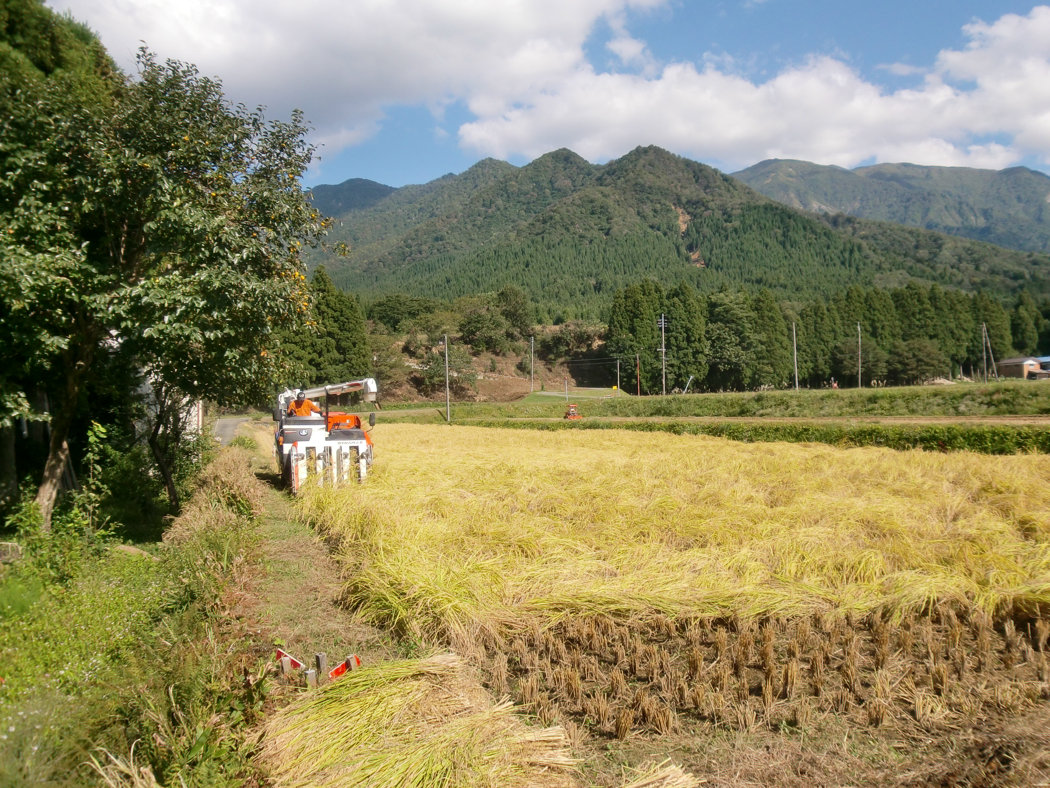 湯舟山魚沼越光